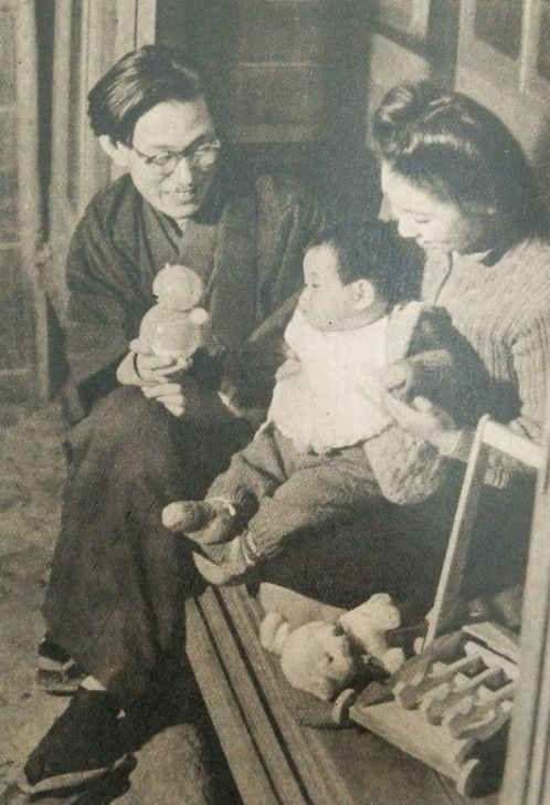 谷川安孝とその家族